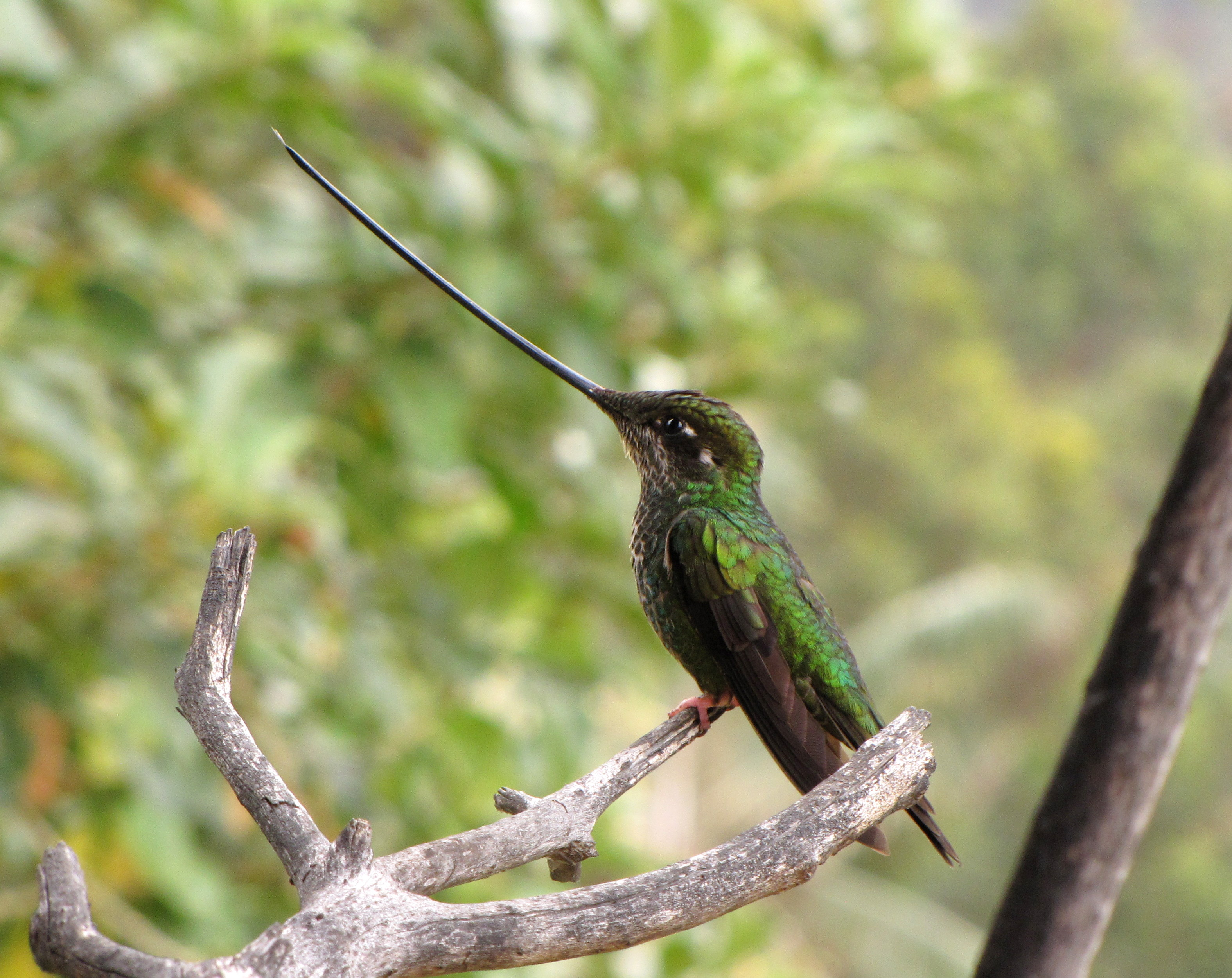 Ensifera ensifera (Pico de sable)